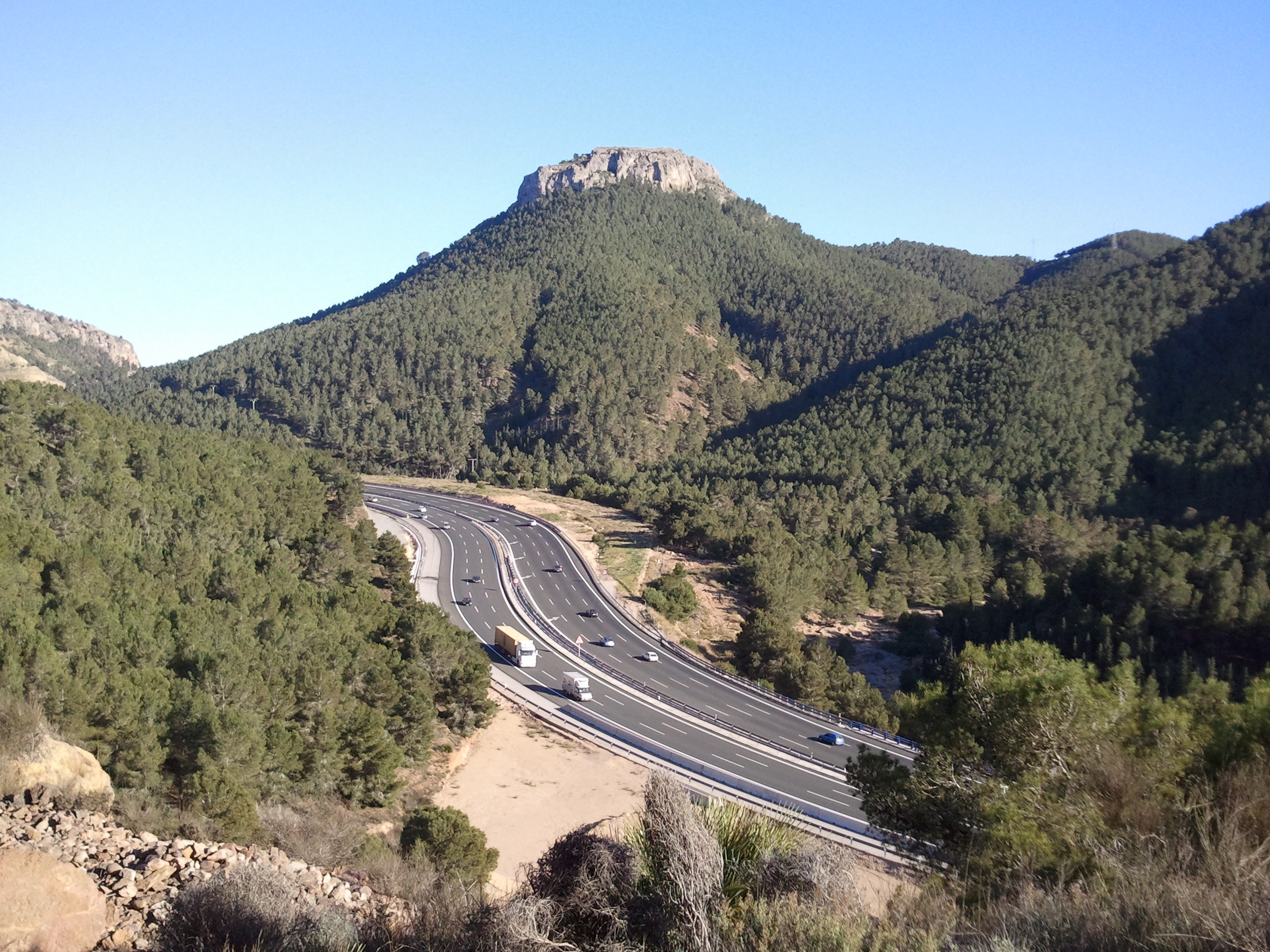 Carrascoy y El Valle This is a photography of a Special Area of Conservation in Spain with the ID: ES6200002. Natura2000 entry, EEA entry